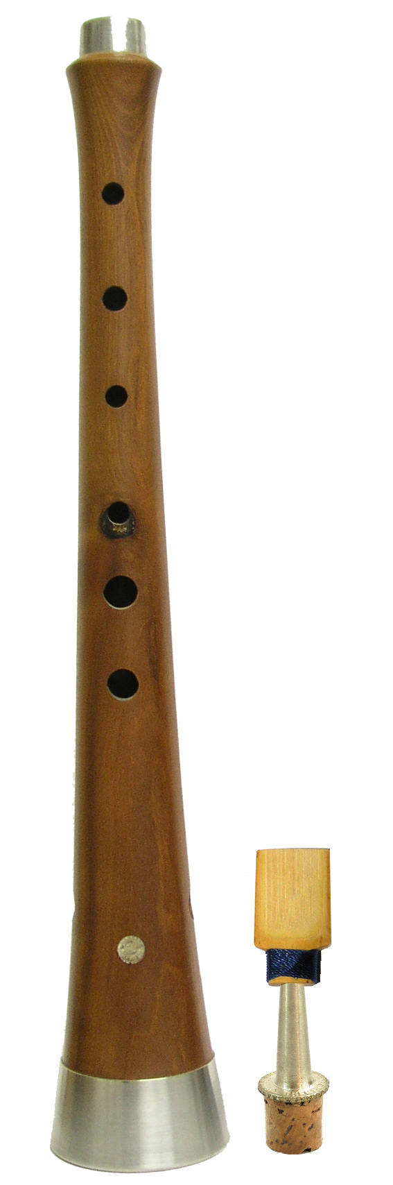 Gralla de Ginjoler del Luthier Josep Bonamusa